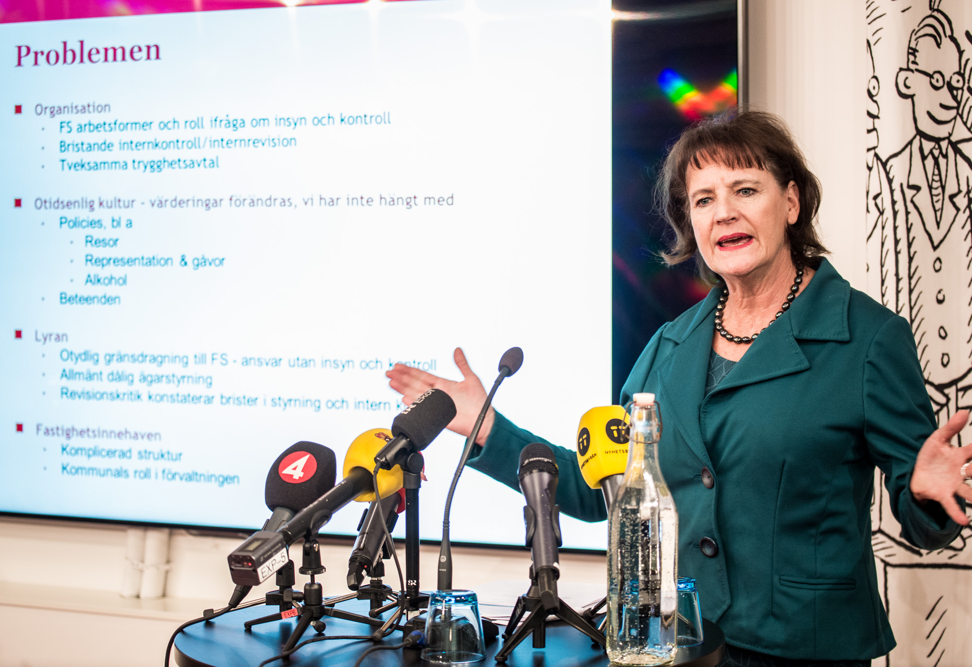 Kommunals ordförande Annelie Nordström ställer sin plats till förfogande vid kongressdagarna i maj. – Fram till dess sitter jag kvar på min post, säger Nordström på presskonferensen den 20 januari 2016.